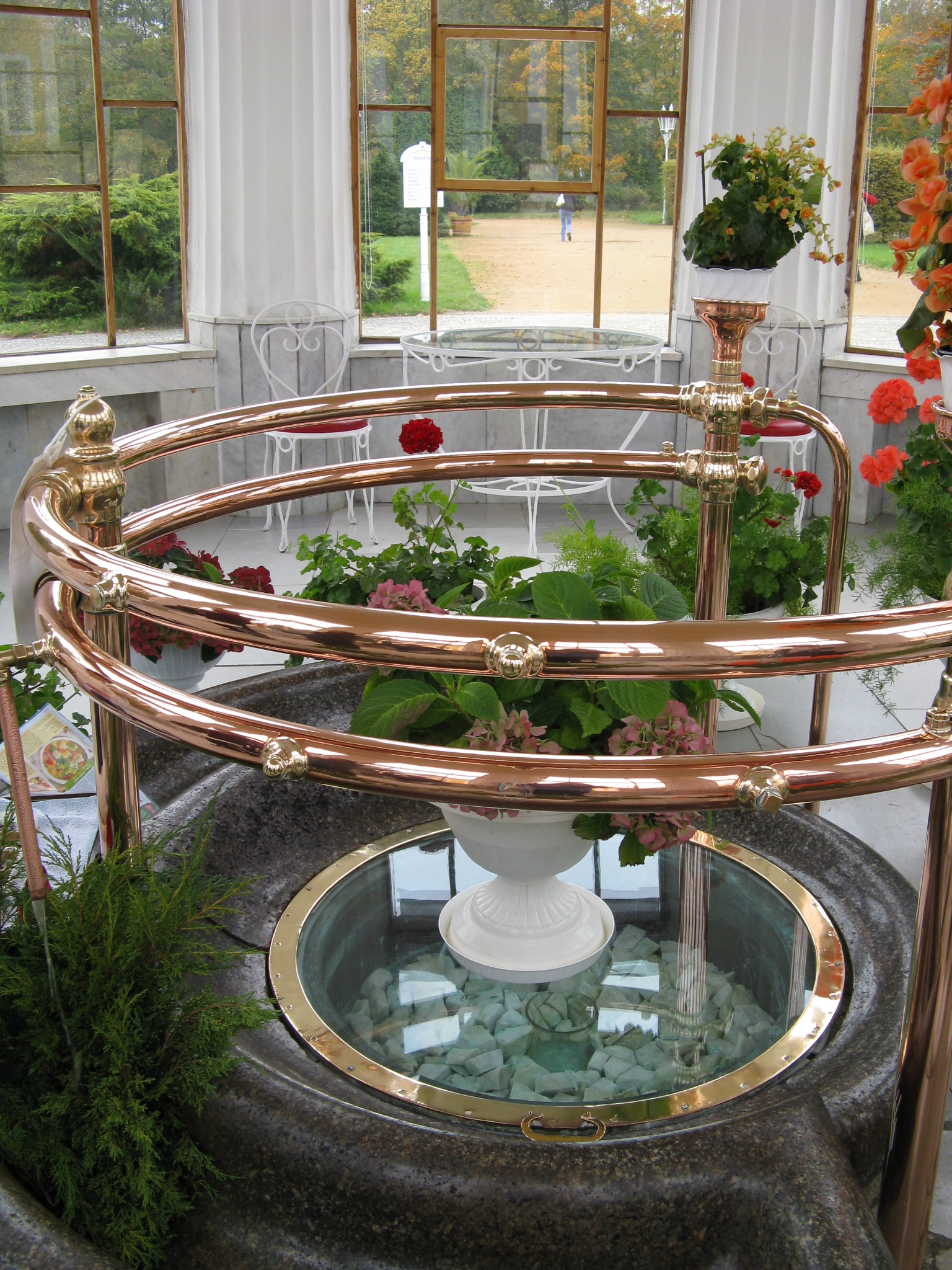 Oldest source in Franzensbad/Bohemia